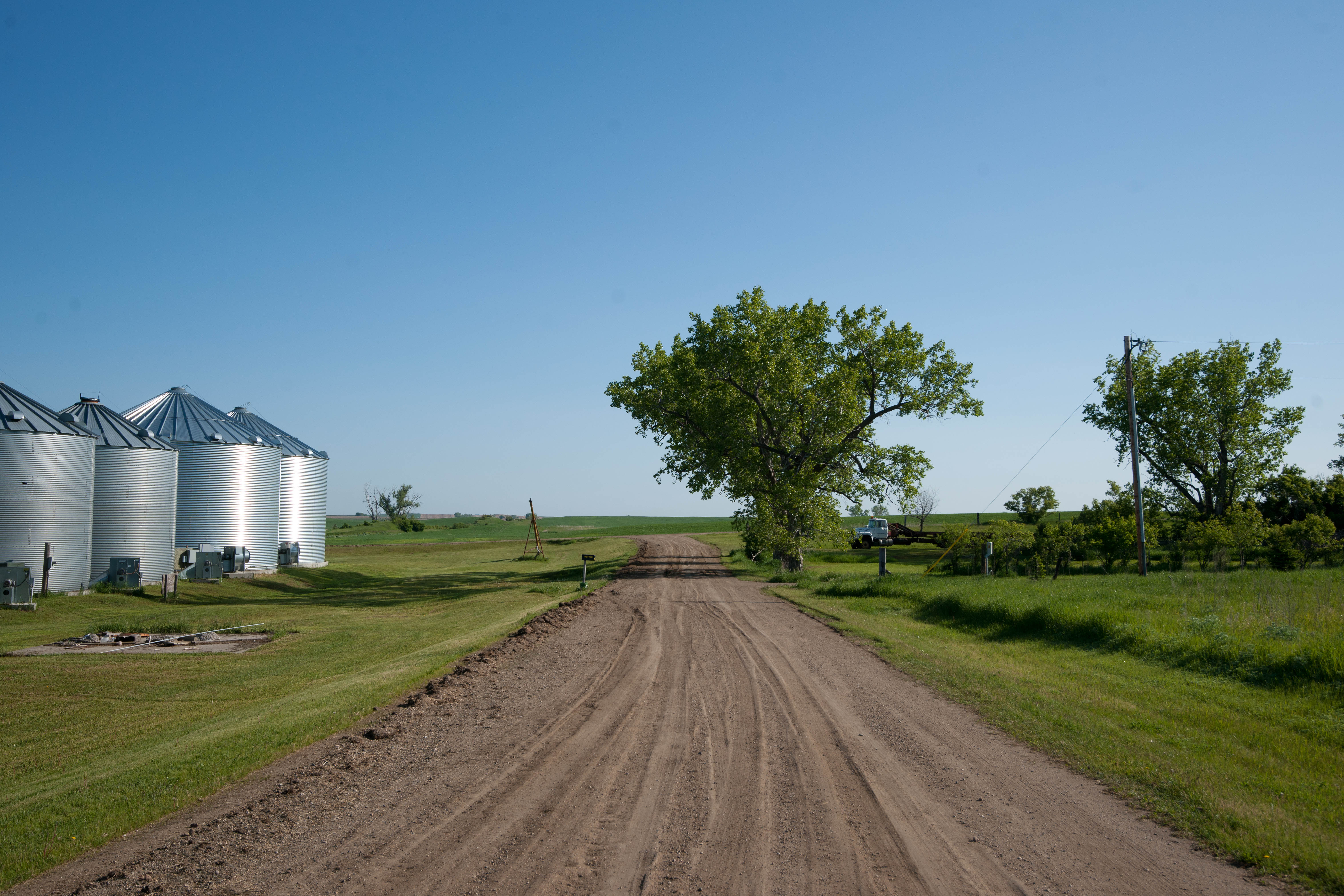 Temvik, North Dakota